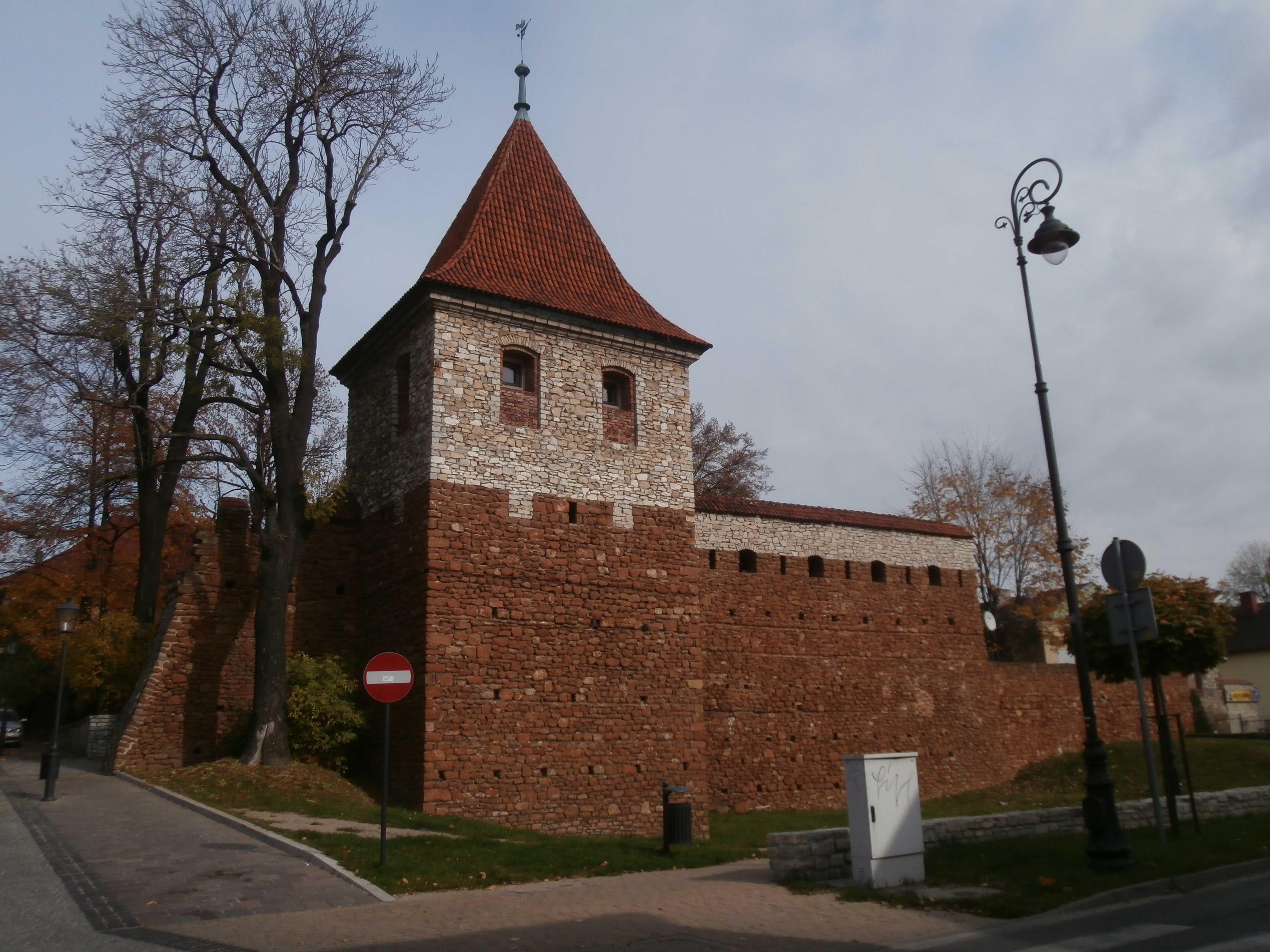 Zrekonstruowany fragment Murów miejskich Olkusza wraz z Basztą o nieznanej nazwie.